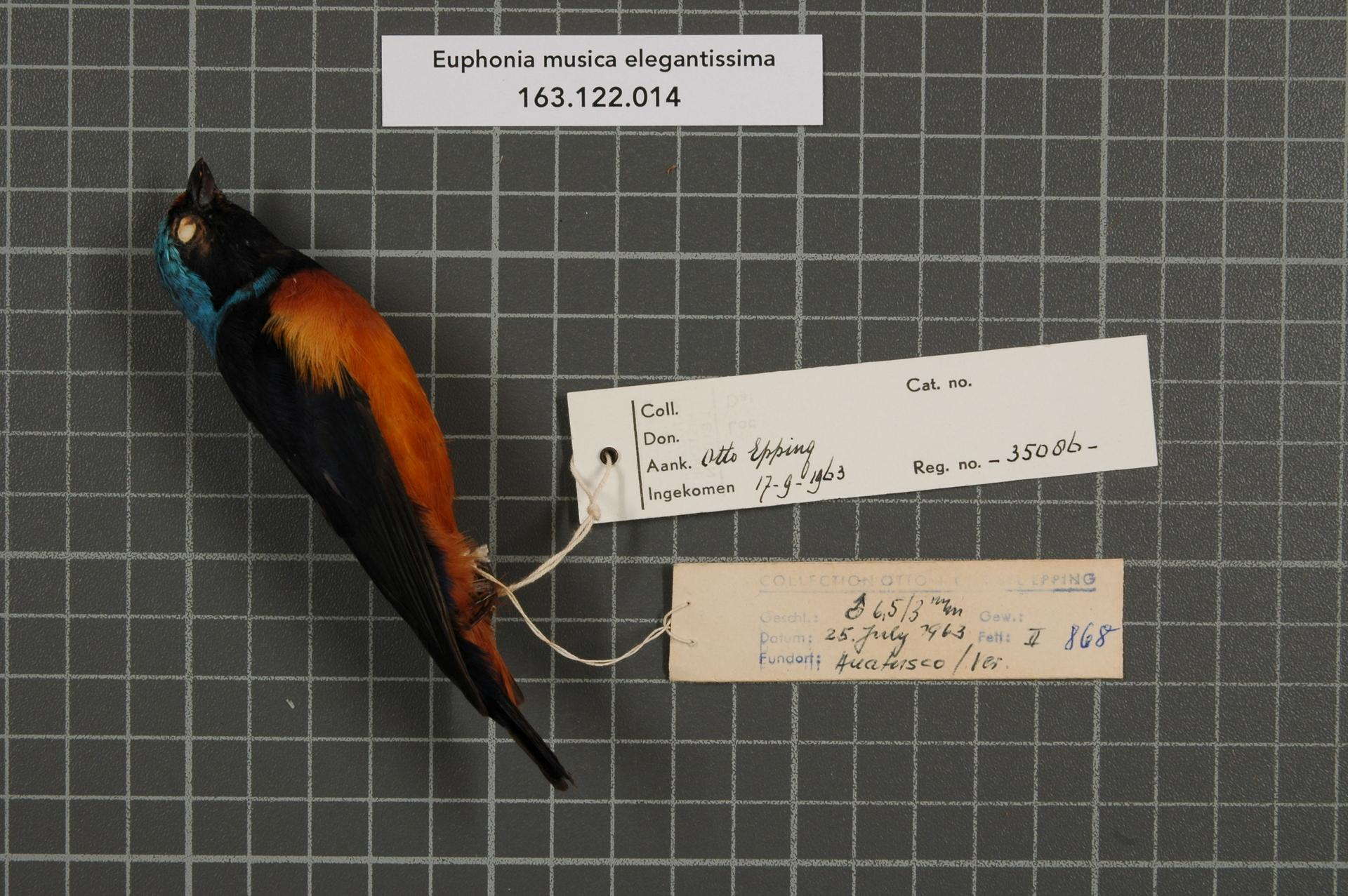 Euphonia musica elegantissima (Bonaparte, 1838)